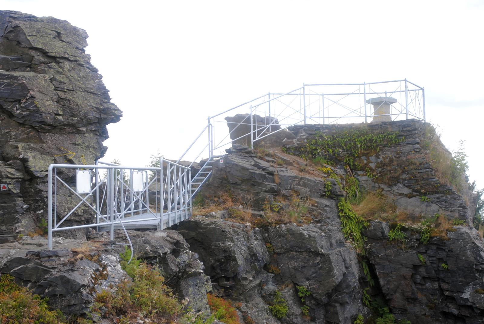 neues Geländer auf dem Vysoky-Kamen (Hoher Stein bei Erlbach)